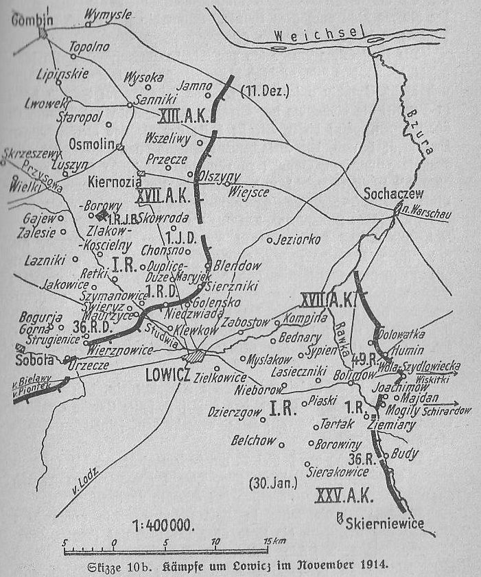 Skizze der Schlacht bei Humin